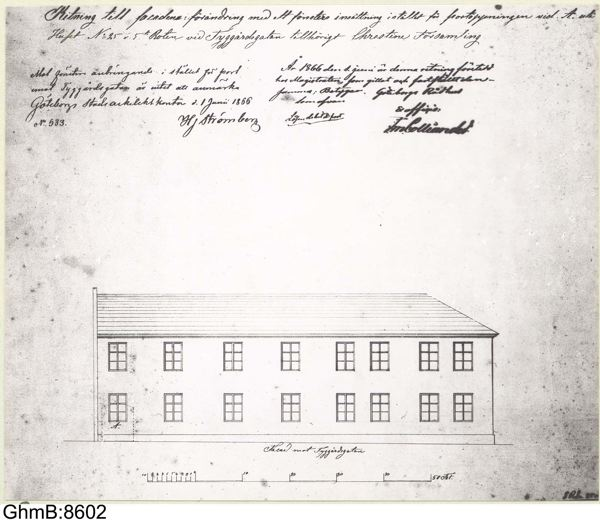 Lokal för Tyska Skolan i hörnet av Köpmans- och Tyggårdsgatorna. Uppförd år 1734, nedbrunnen 1746. (sic!) Ritning till facadens förändring med ett fönsters insättning i stället för portöppningen vid A. uti Huset No 25 i 5te Roten vid Tyggårdsgatan tillhörigt Christine Församling Med fönsters anbringande i stället för port emot Tyggårdsgatan är intet att anmärka Göteborgs Stadsarkitektkontor d. 1 Junii 1866 Nr 633. Hj. Strömberg År 1866 den 1. juni är denna ritning företedd(?) hos Magistraten, som gillat och fastställt densamma; Betygar/betygas. Göteborgs Rådshus som ofvan Lösen debit å post(?) Ex officio: .... M. Colliander